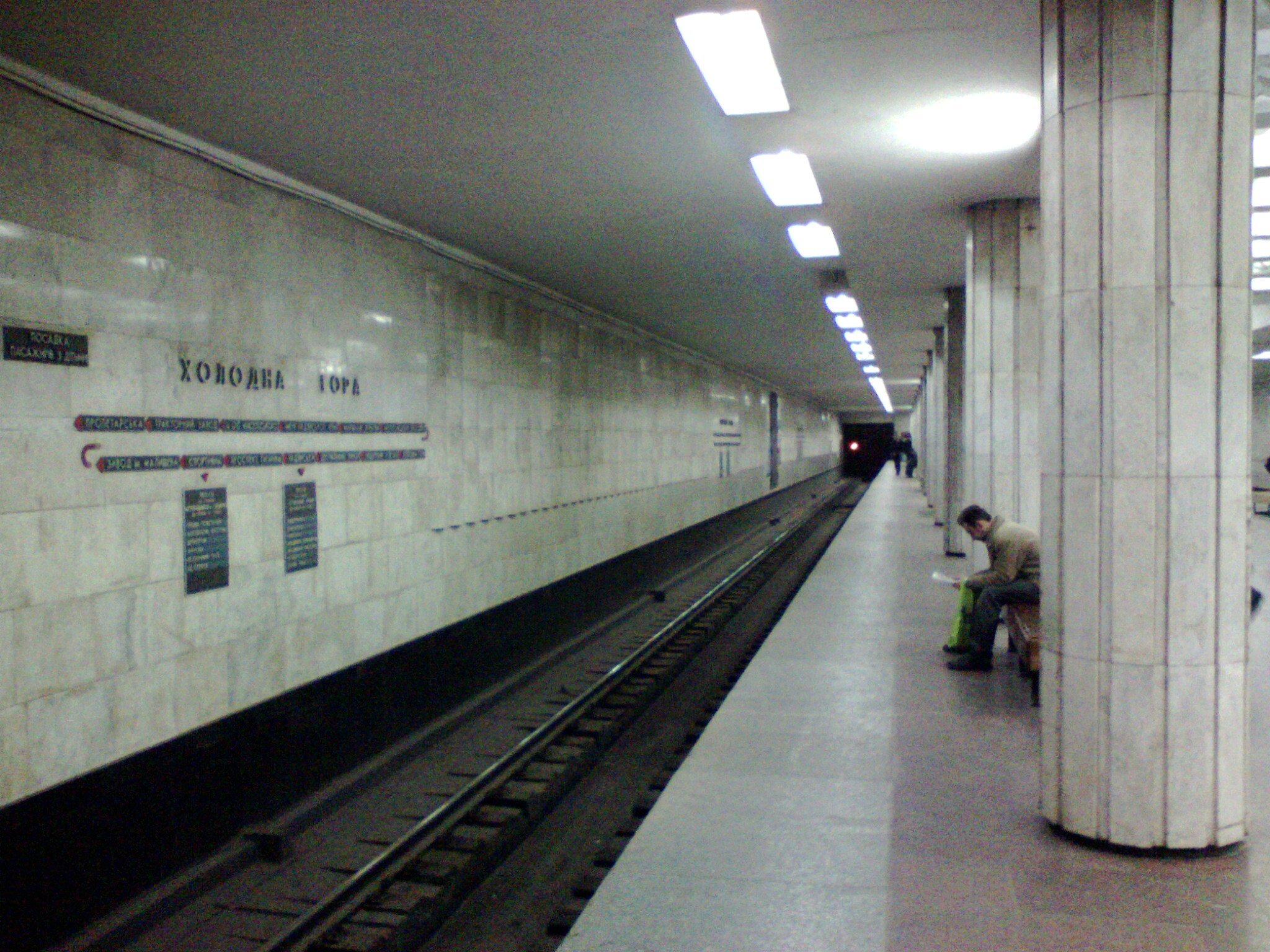 Stanzia metro Xolodnaua Gora